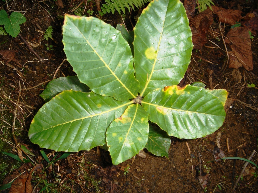 Quercus pontica seedling